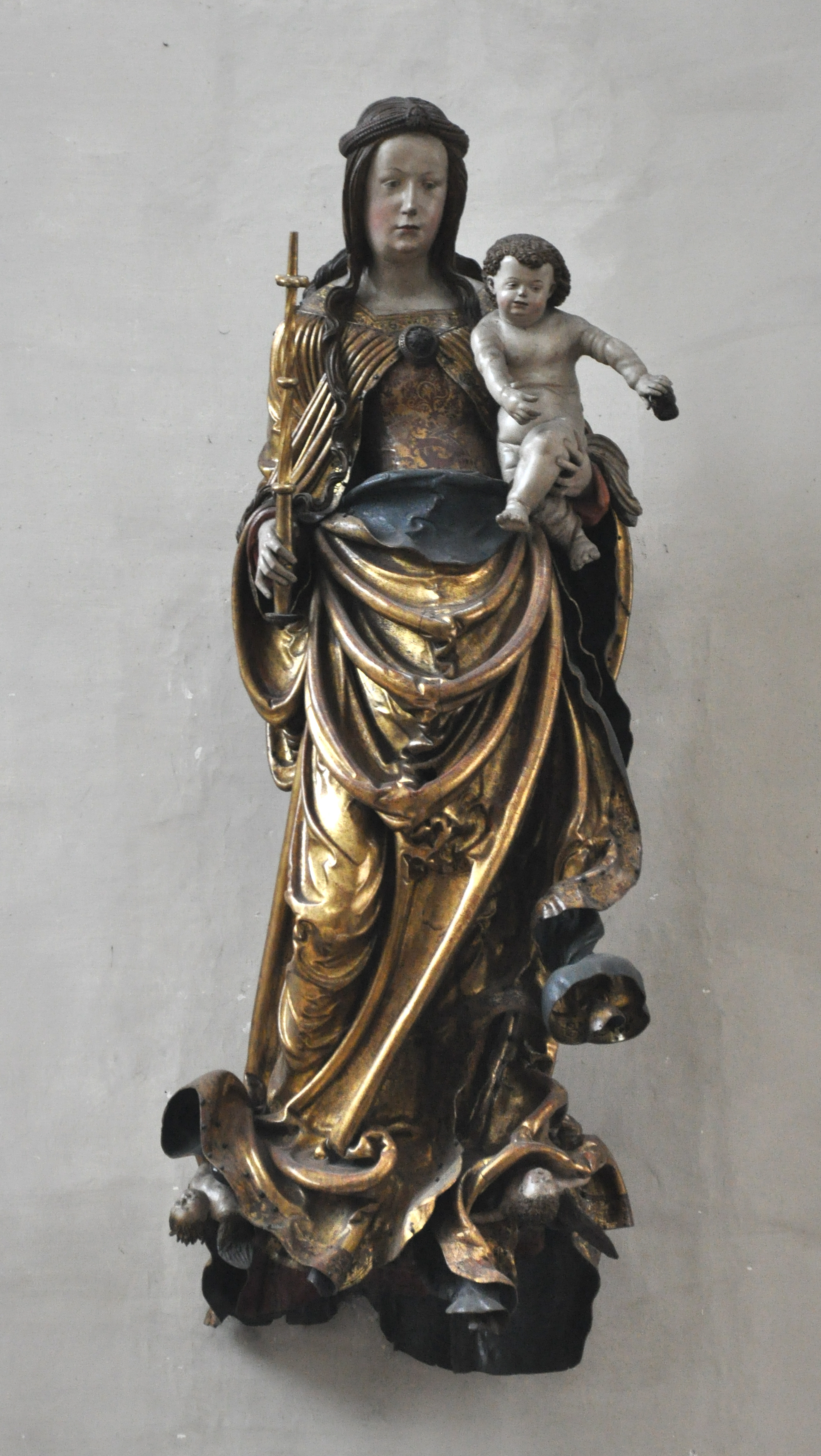 Landshut, St. Martin, Rosenkranzmadonna, um 1516-1518